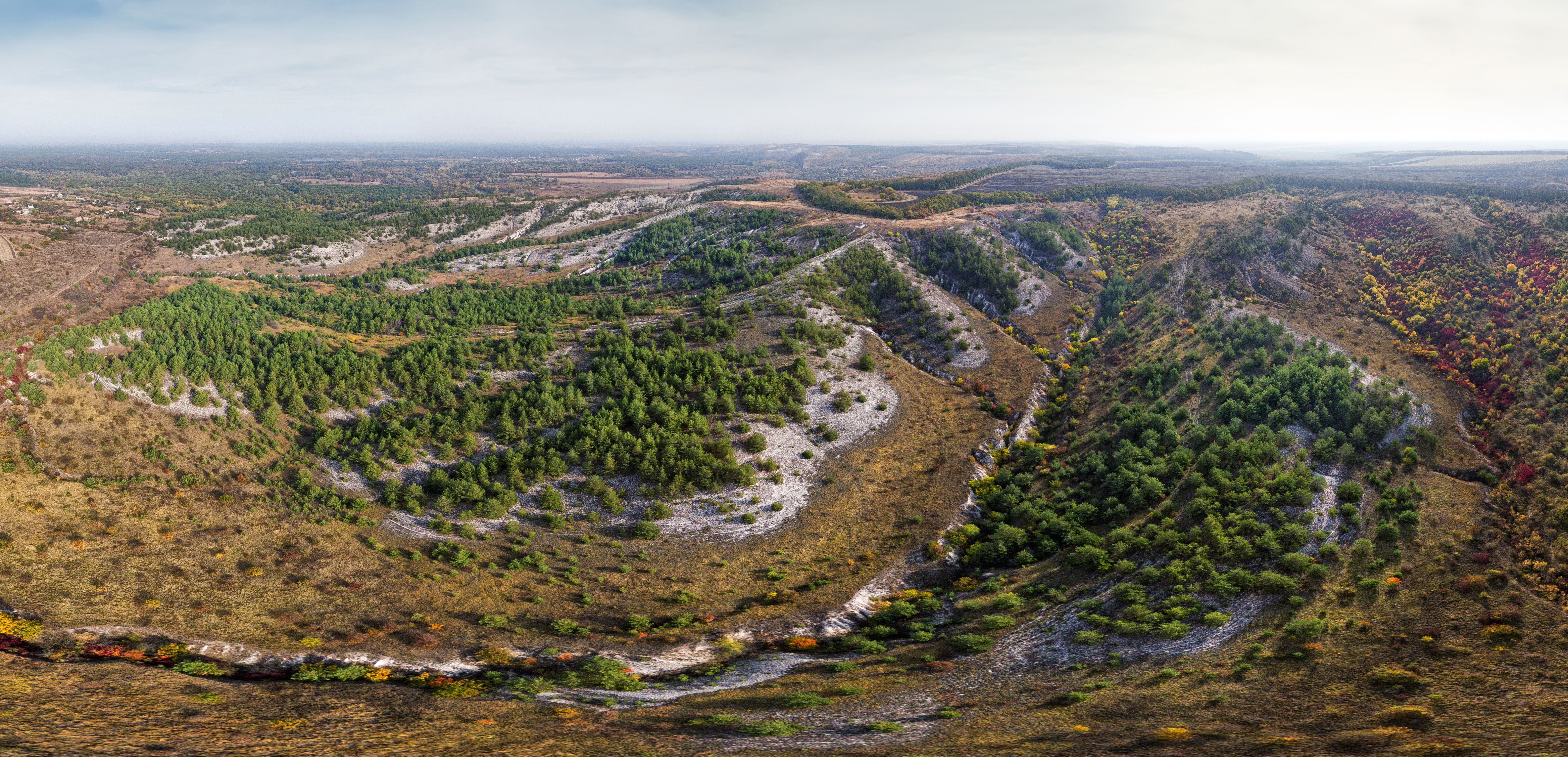 Крейдяна флора, Слов'янський р-н, біля с. Піскунівка, Краснолиманський р-н, біля с. Закітне та с. Крива Лука Слов'янський (634,0 га) та Краснолиманський р-ни (500,0 га)